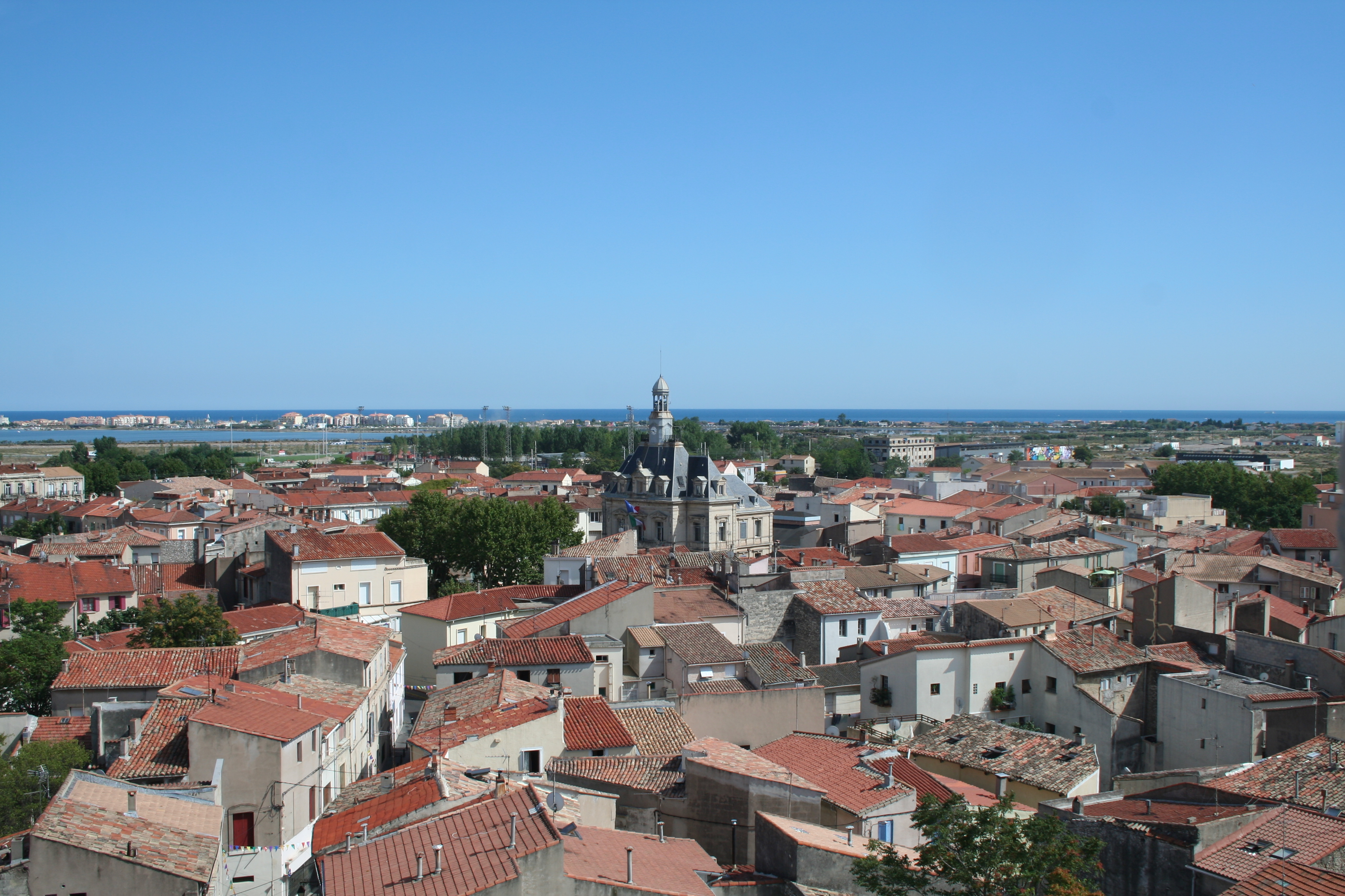 Frontignan (Hérault) - vue sur le vieux village, la mairie, les étangs, la mer - photo prise depuis le clocher.